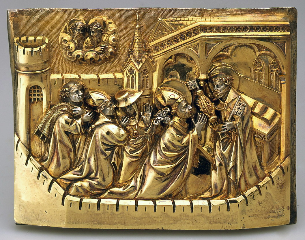 Aus Dankbarkeit für eine Heilung stiftete Herzog Heinrich von Bayern (1386-1450) 1403 der Servatiuskirche in Maastricht eine Reliquienbüste. Sie zeigt den Heiligen Servatius, der 384 als Bischof von Tongern starb. Die acht silbervergoldeten Reliefplatten zierten ursprünglich den achteckigen Sockel der nicht mehr erhaltenen Büste. Objekt (pro Platte): Höhe: 10,70 cm; Breite: 13,80 cm; Tiefe: 2,50 cm. Mit großer Erzählfreude und realistischer Genauigkeit zeigen die Reliefs Begebenheiten aus der Legende des Heiligen: hier, die Schlüsselübergabe für die Himmelspforte durch Petrus.